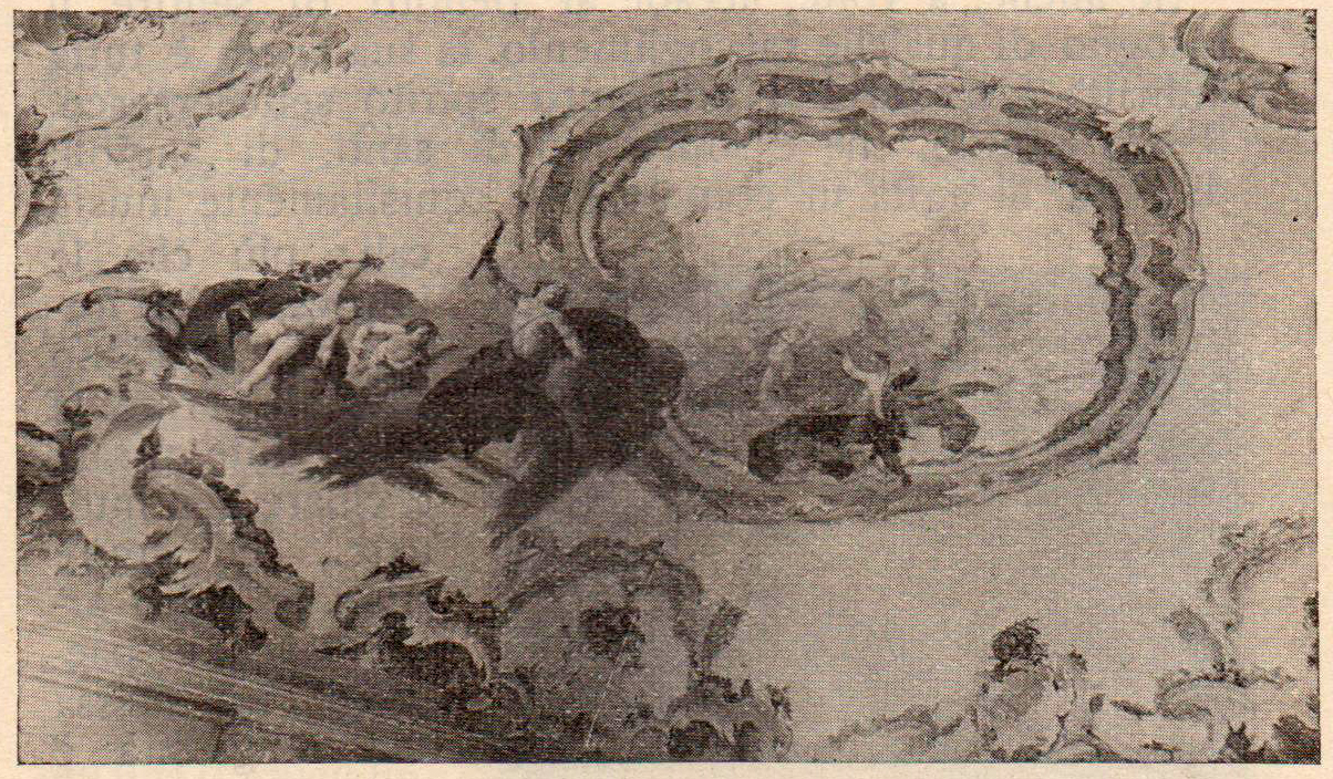 Affresco raffigurante una Scena mitologica, opera di Biagio Bellotti degli anni 1750 nella sala di rappresentanza di palazzo Lucini Arborio Mella a San Giorgio su Legnano.